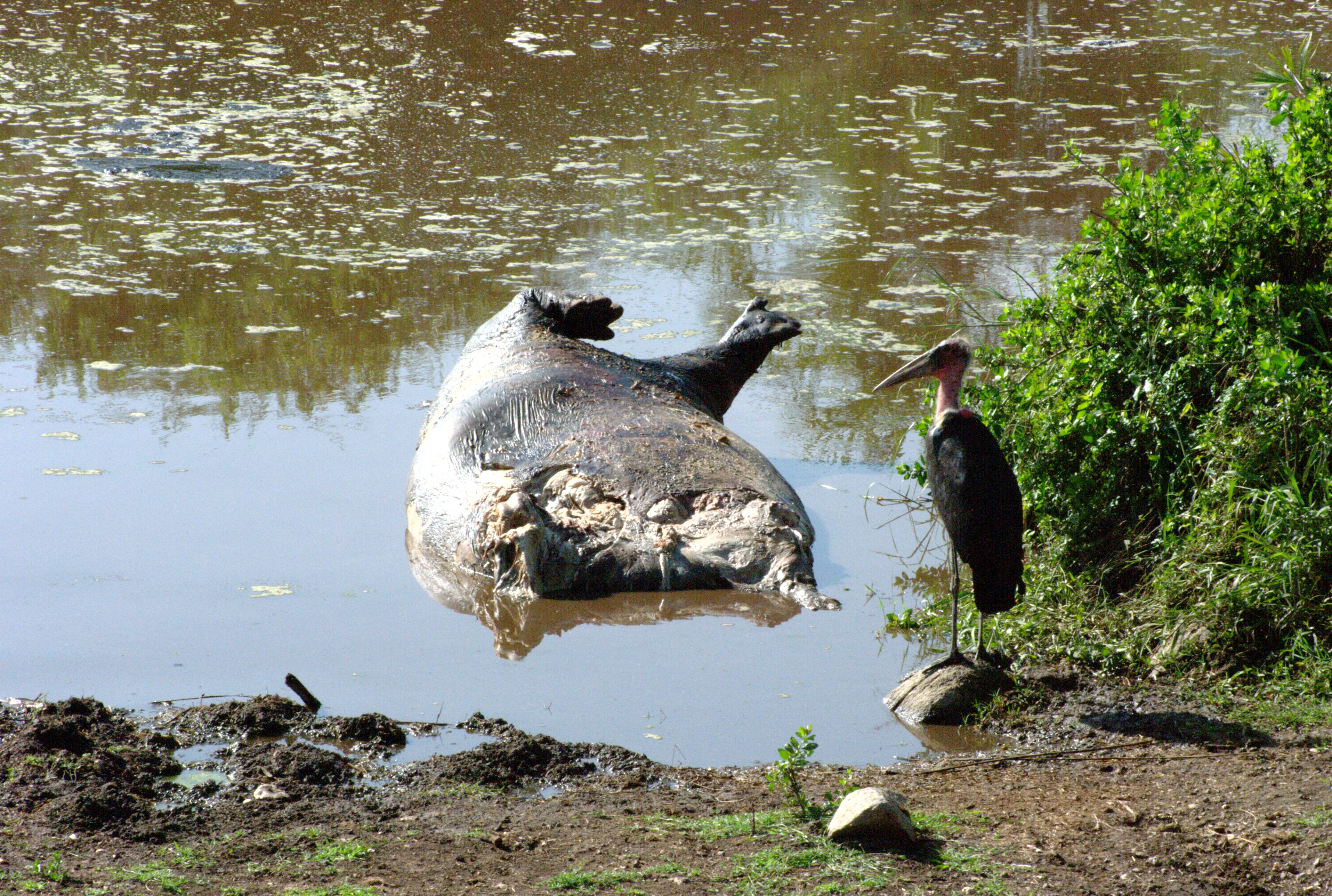 Grand marabout Leptoptilos crumeniferus devant le cadavre d'un hippopotamus amphibius, région du Serengeti, en Tanzanie.